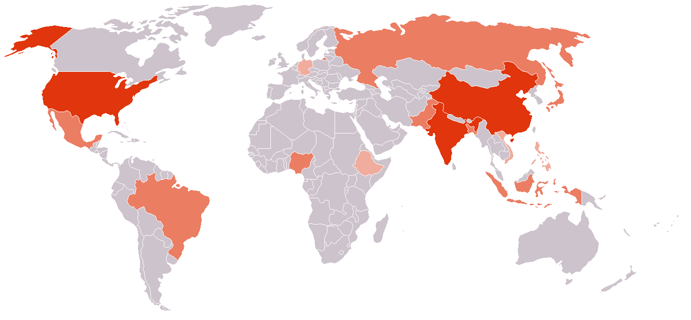 Die 15 bevölkerungsreichsten Staaten der Welt Die Weltkarte zeigt die 15 bevölkerungsreichsten Staaten. Die Angaben sind dem DSW-Datenreport 2010 der Deutschen Stiftung Weltbevölkerung vom August 2010 entnommen und entsprechen der Publikation des Population Reference Bureau: 2010 World Population Data Sheet. Rot: Volksrepublik China: 1346 Millionen (etwa 19,5 % der Weltbevölkerung) Indien: 1189 Mio. (etwa 17,3 %) USA: 310 Mio. (etwa 4,5 %) Mittel-Rot: Indonesien: 236 Mio. (etwa 3,4 %) Brasilien: 193 Mio. (etwa 2,8 %) Pakistan: 185 Mio. (etwa 2,7 %) Bangladesch: 164 Mio. (etwa 2,4 %) Nigeria: 158 Mio. (etwa 2,3 %) Russland: 142 Mio. (etwa 2,1 %) Japan: 127 Mio. (etwa 1,9 %) Mexiko: 111 Mio. (etwa 1,6 %) Hellrot: Philippinen: 94 Mio. (etwa 1,4 %) Vietnam: 89 Mio. (etwa 1,3 %) Äthiopien: 85 Mio. (etwa 1,2 %) Deutschland: 82 Mio. (etwa 1,2 %) Quelle: erstellt von Benutzer:Neitram basierend auf der leeren Weltkarte Image:BlankMap-World.png Lizenz: GFDL